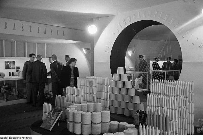 Original image description from the Deutsche Fotothek Ausstellungsstand des VVB Baumwollspinnereien und des VVB Bastfaser